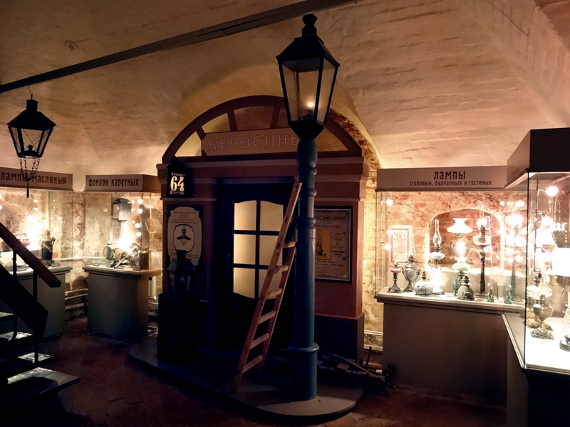 Музей "Огни Москвы". Первый зал музея - история от лучины до керосинового фонаря